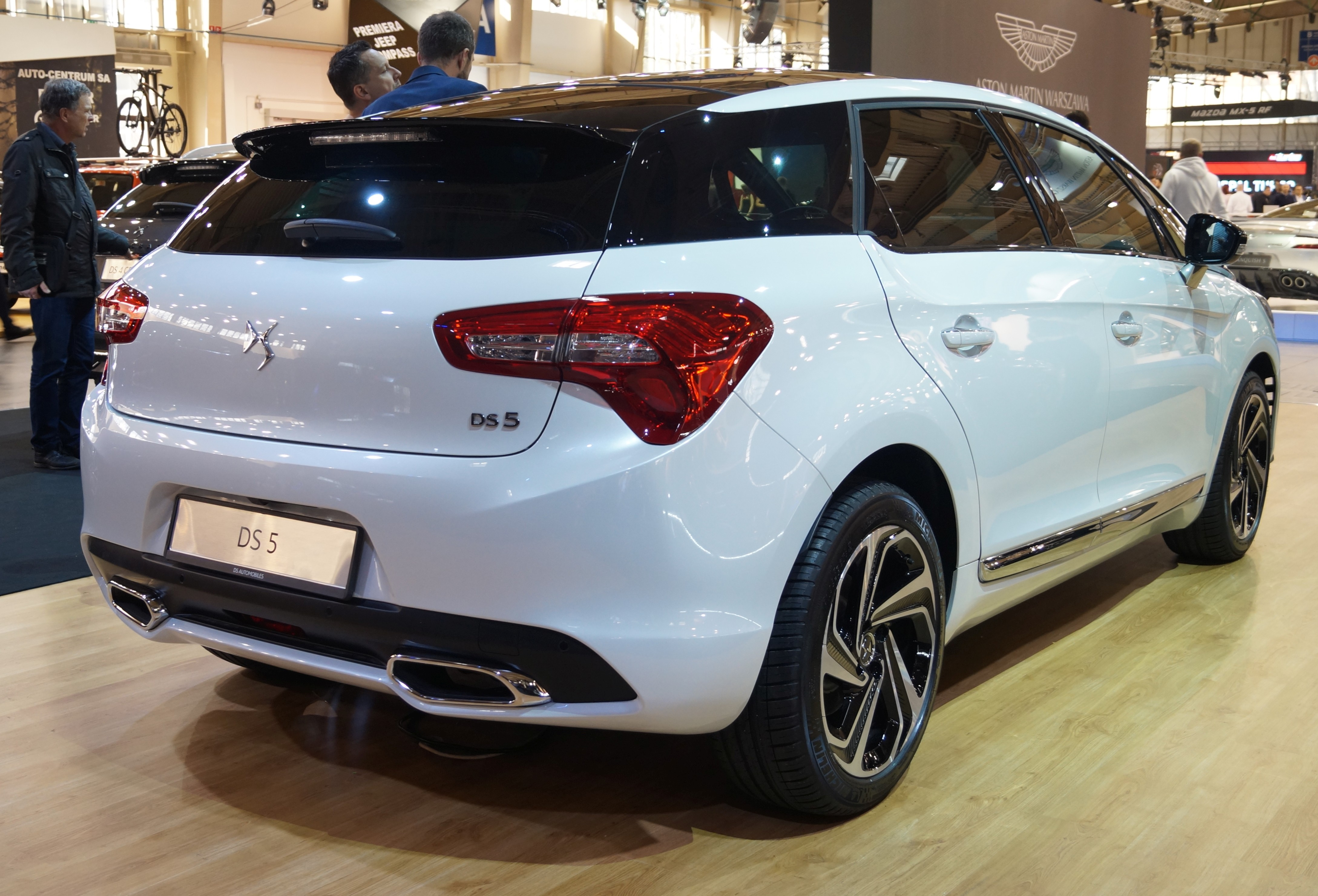 Prawy tył DS 5 na Motor Show Poznań 2017.